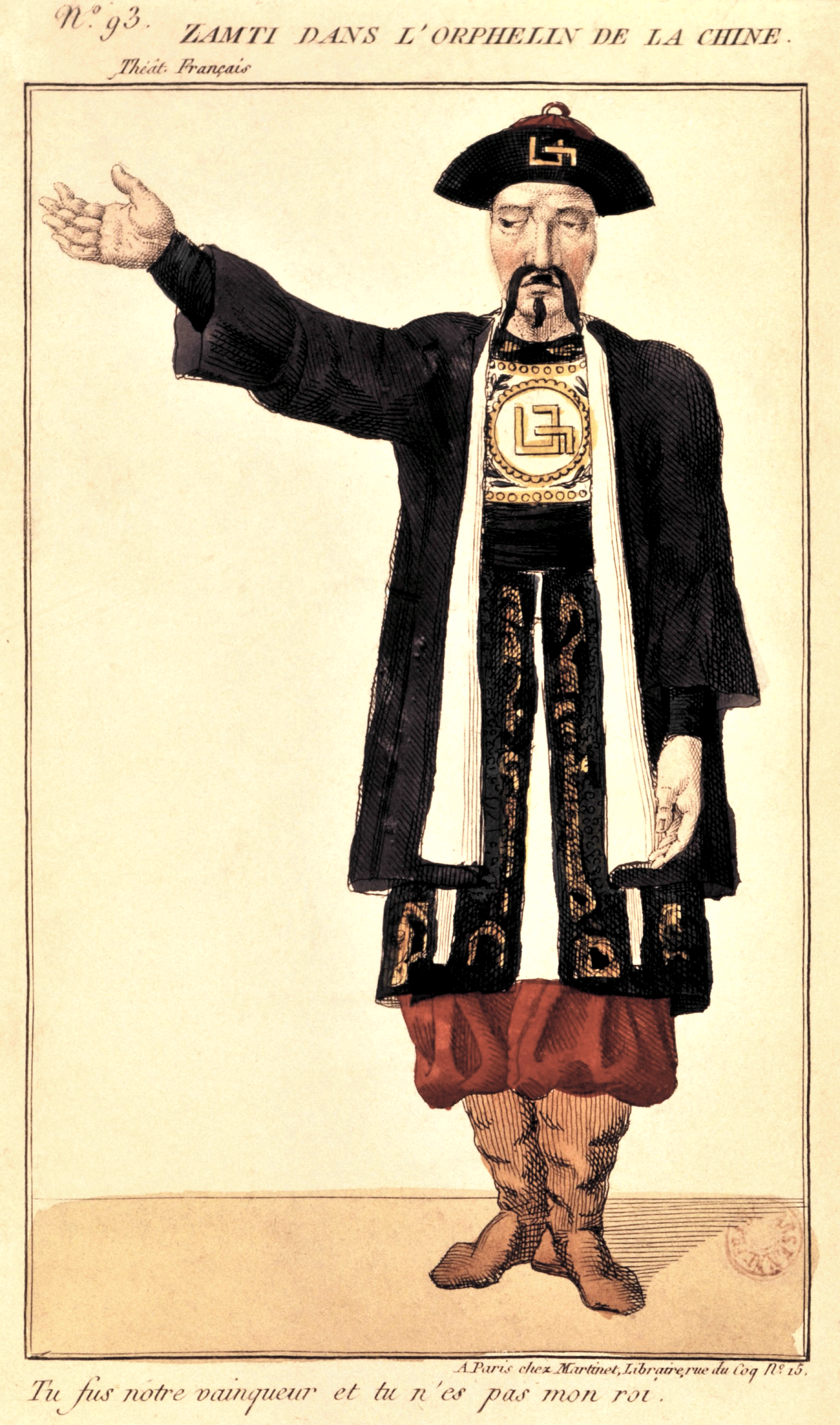 Pierre Sarrazin (1689-1763) costume pour Zamti, dans l'orphelin de la Chine, pièce de Voltaire, estampe eau-forte.